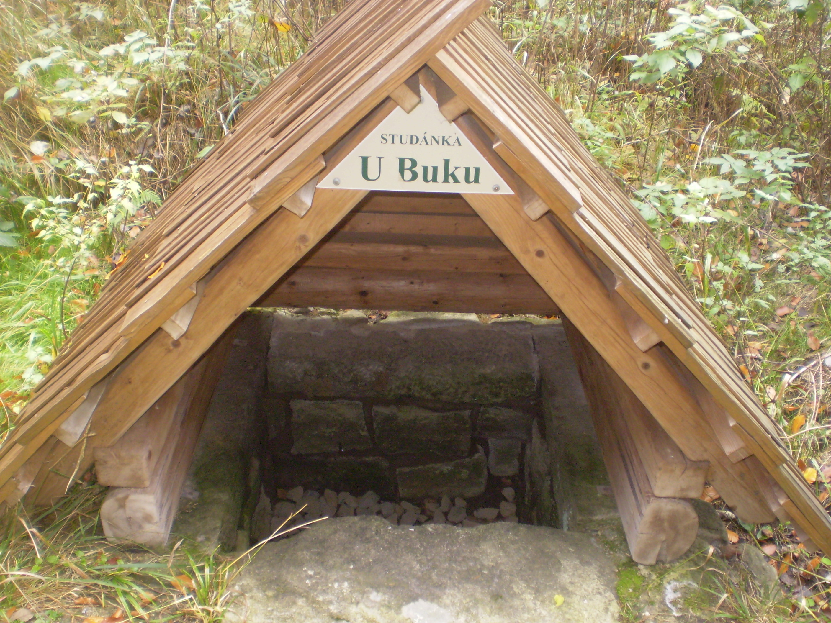 studánka U Buku